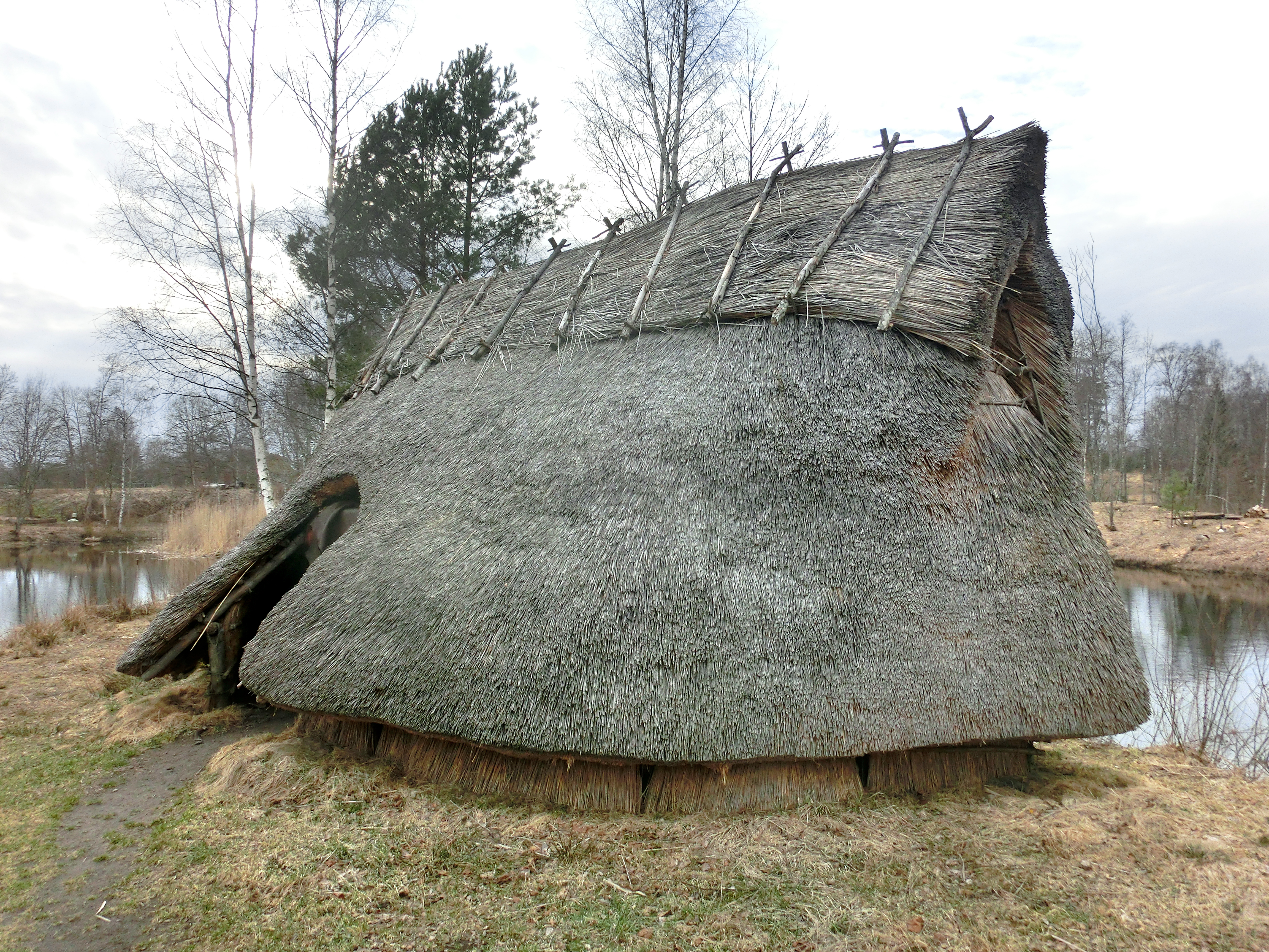 En mesolitisk hydda i början av april på Ekehagens forntidsby strax utanför Åsarp i Falköpings kommun, Västergötland, Västra Götalands län, Sverige